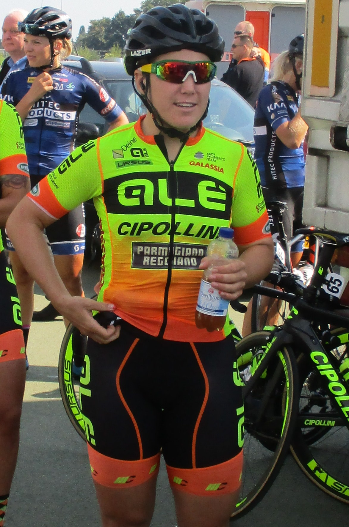 Start van de 6e etappe van de Boels Ladies Tour 2017 op het Tom Dumoulin Bike Park in Sittard-Geleen.